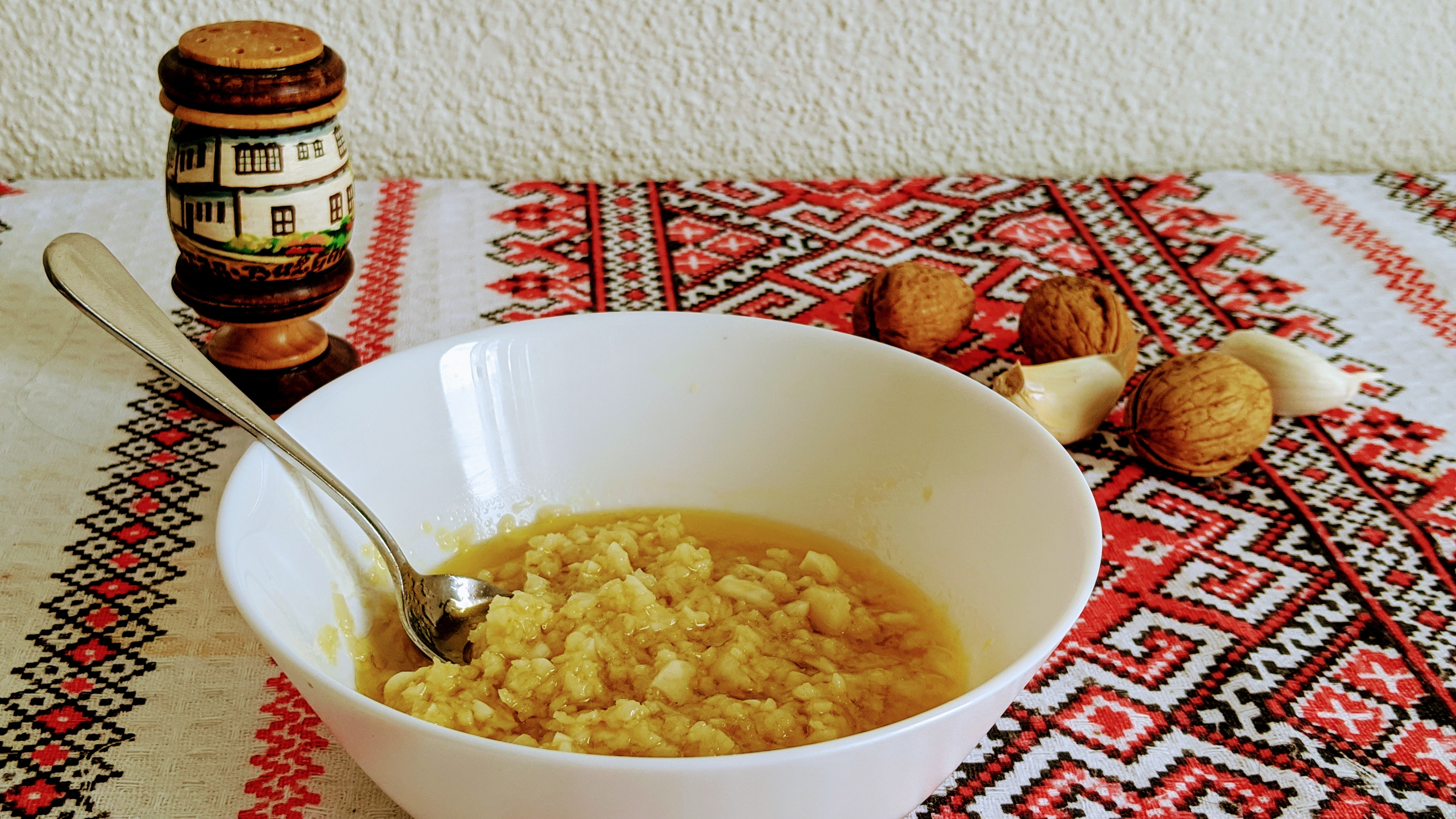 Традиционна разядка с чесън от радомирското село Долни Раковец